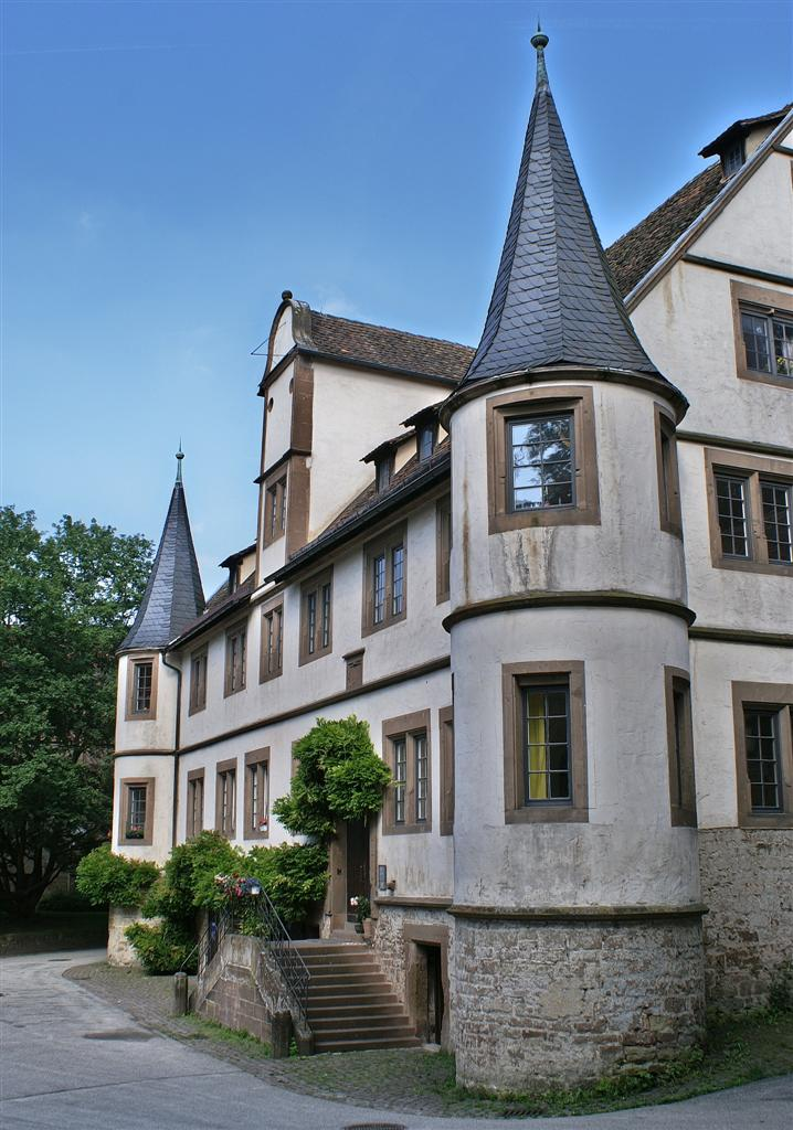 Kloster Maulbronn - Herzogliches Schloss